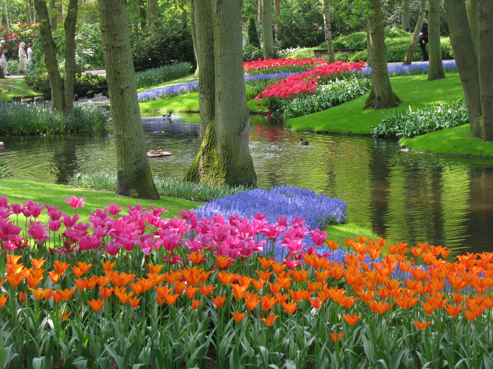 Keukenhof